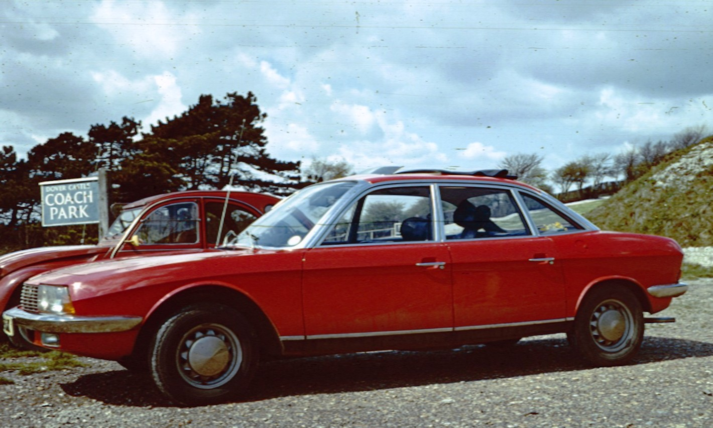 NSU Ro80 Seitenansicht